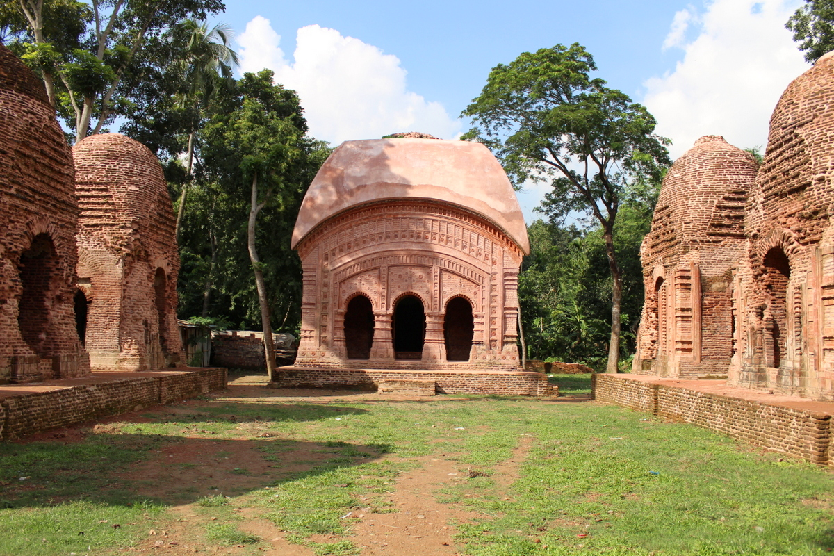 এগারো শিব মন্দির